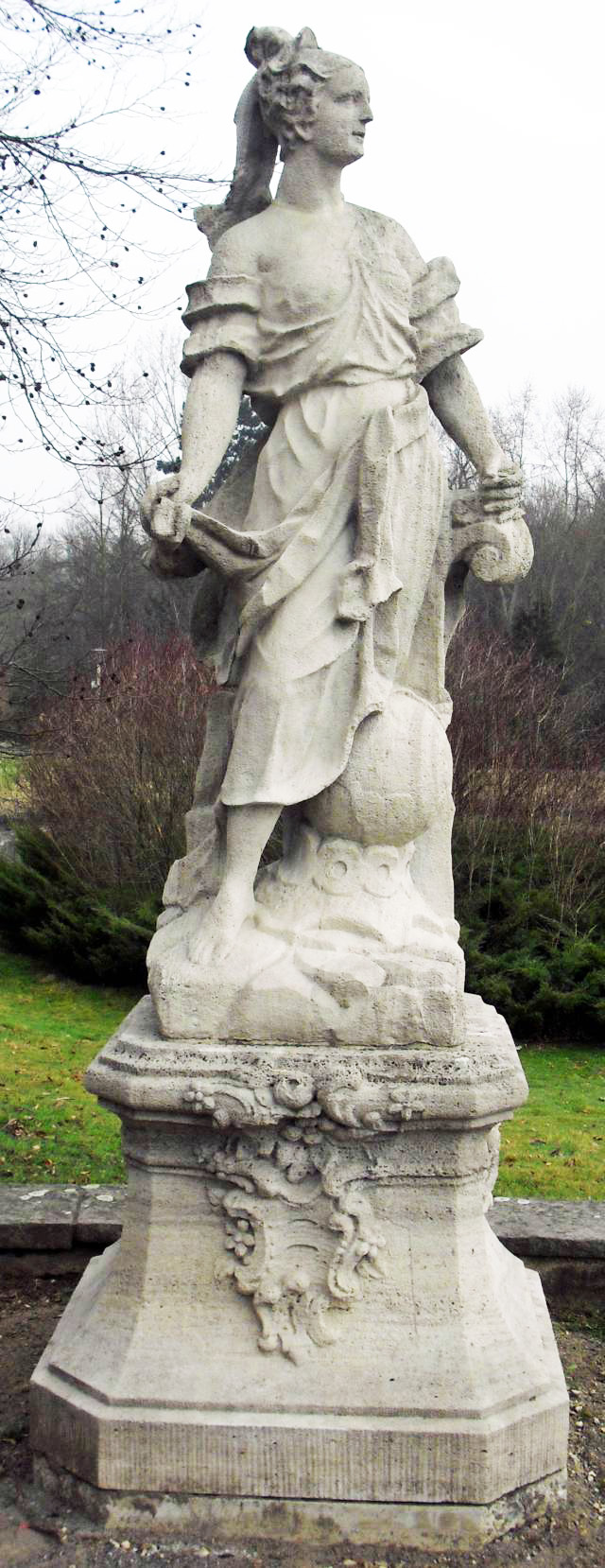 Urania - Muse der Astronomie steht auf Himmelsglobus. Kopie von Fritz Walter Kunze um 1890 aus Würzburger Muschelkalk (Barockoriginale standen im Hofgarten Veitshöchheim von Hofbildhauer Johann Wolfgang van der Auvera).